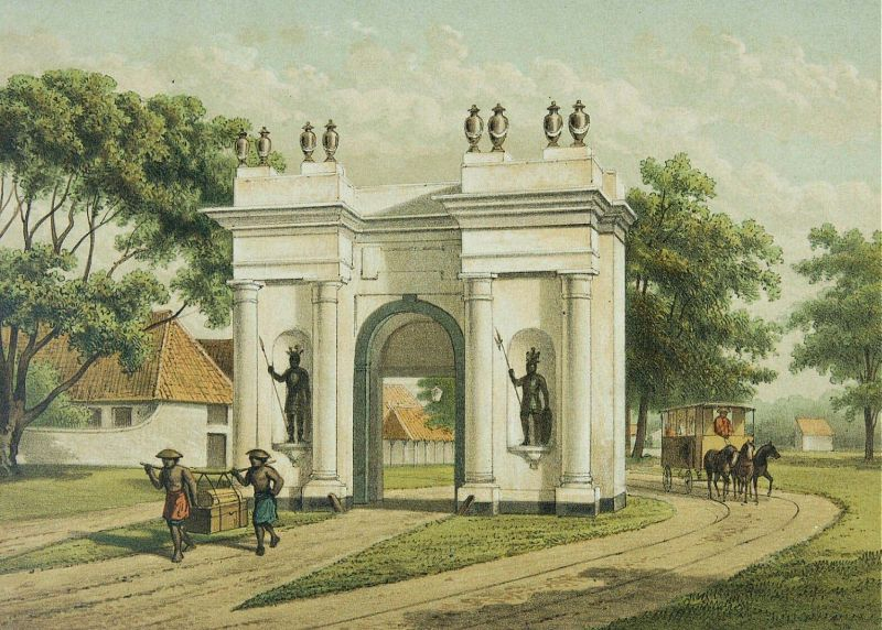 Litho. Litho naar een oorspronkelijke aquarel van J. Rappard.. De oude kasteelpoort van Batavia